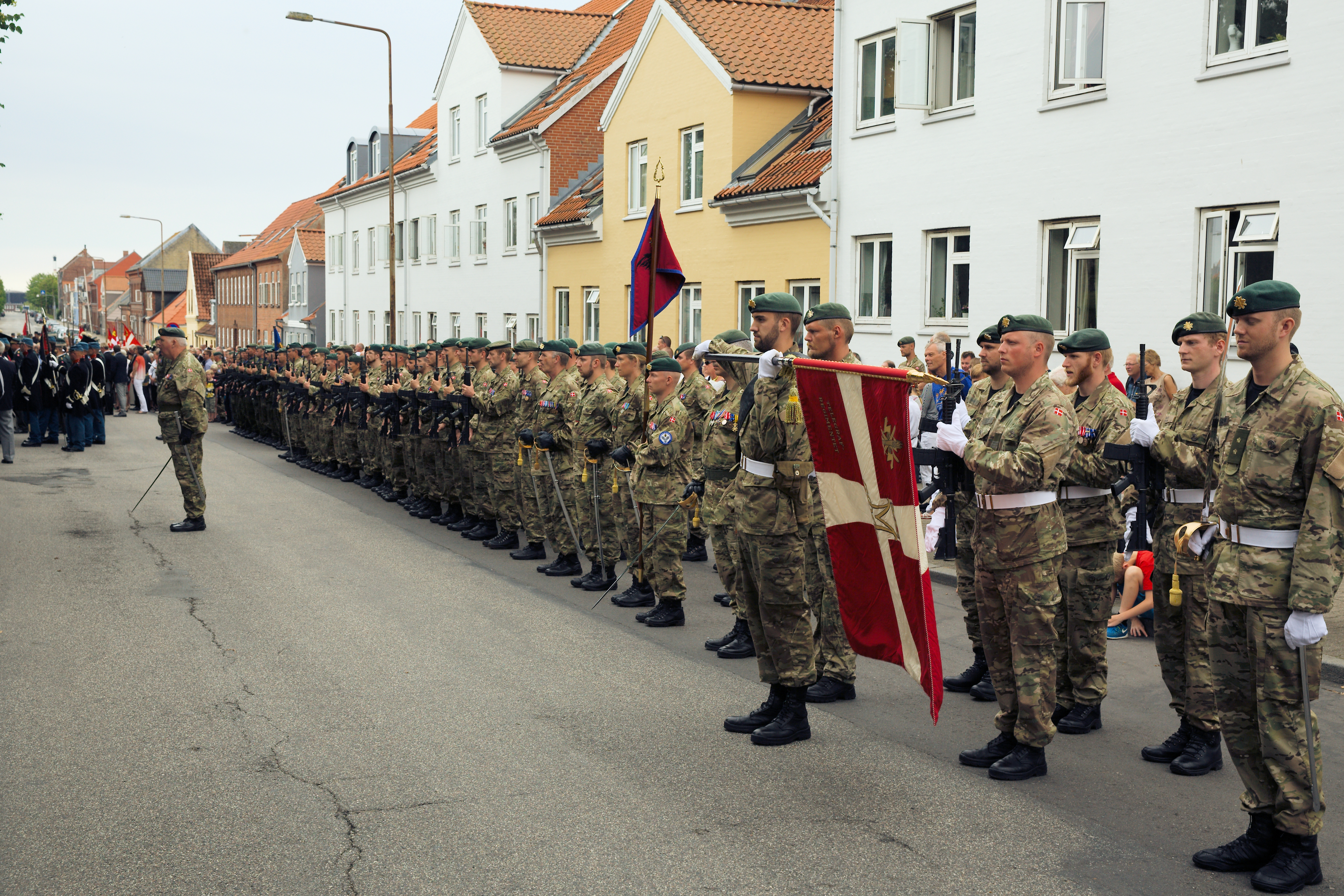 Parade 6 juli 2014 i Fredericia foran Krigergravene ved Trinitatis Kirke